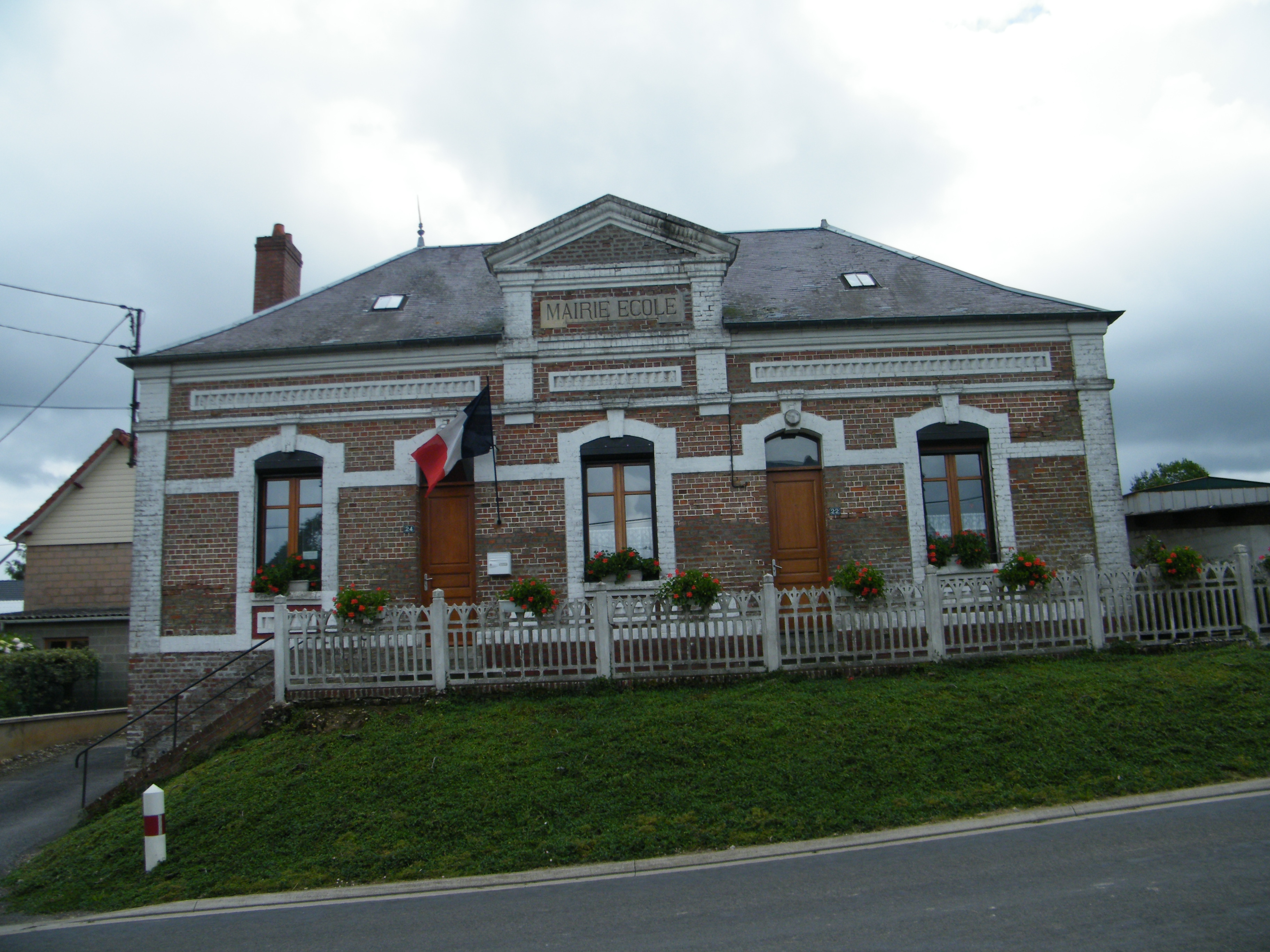 Mairie.